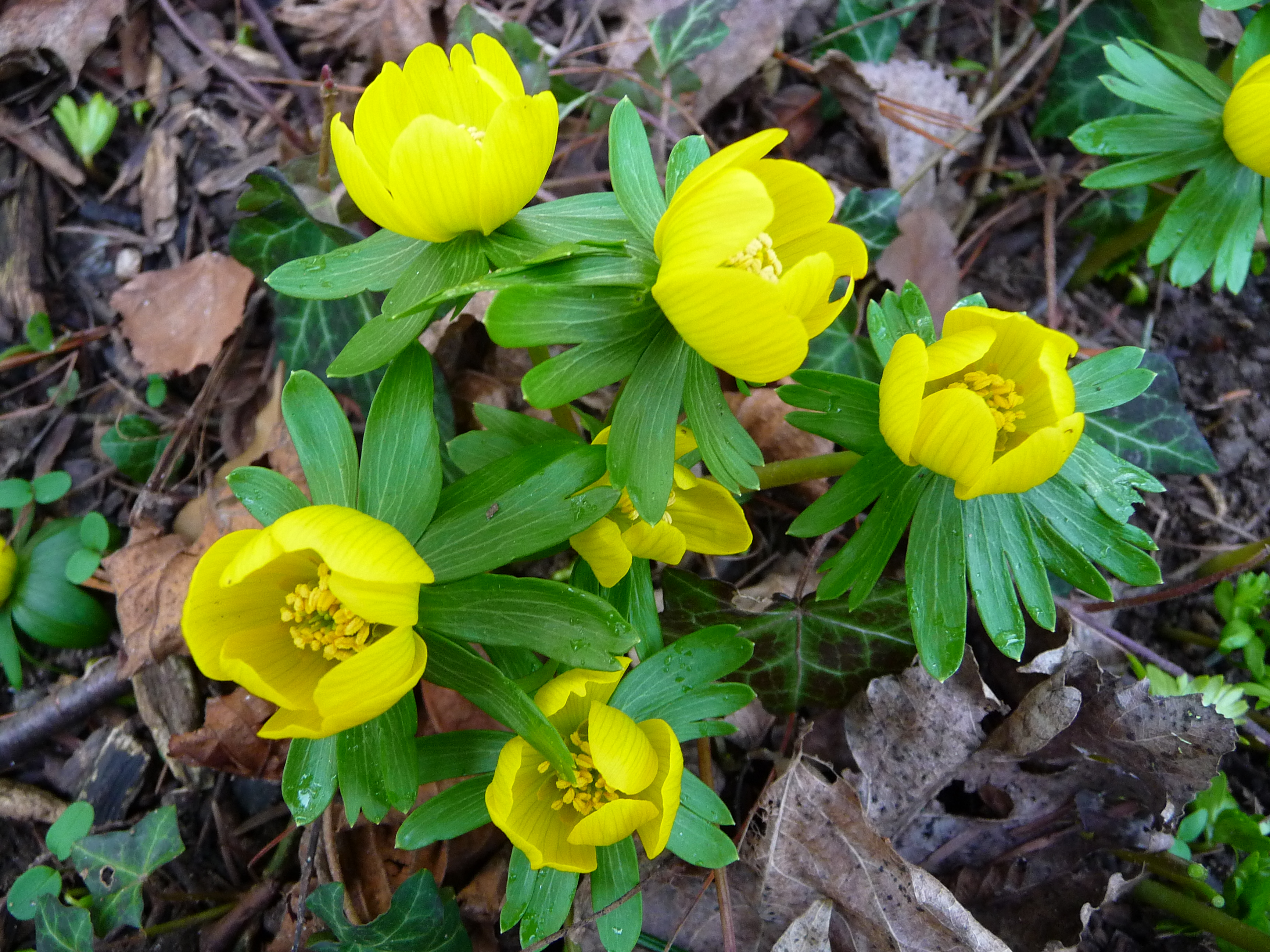 Winterling (Eranthis hyemalis), aufgenommen Ende Februar 2009 im Rhein-Neckar-Kreis, Baden-Württemberg, Deutschland